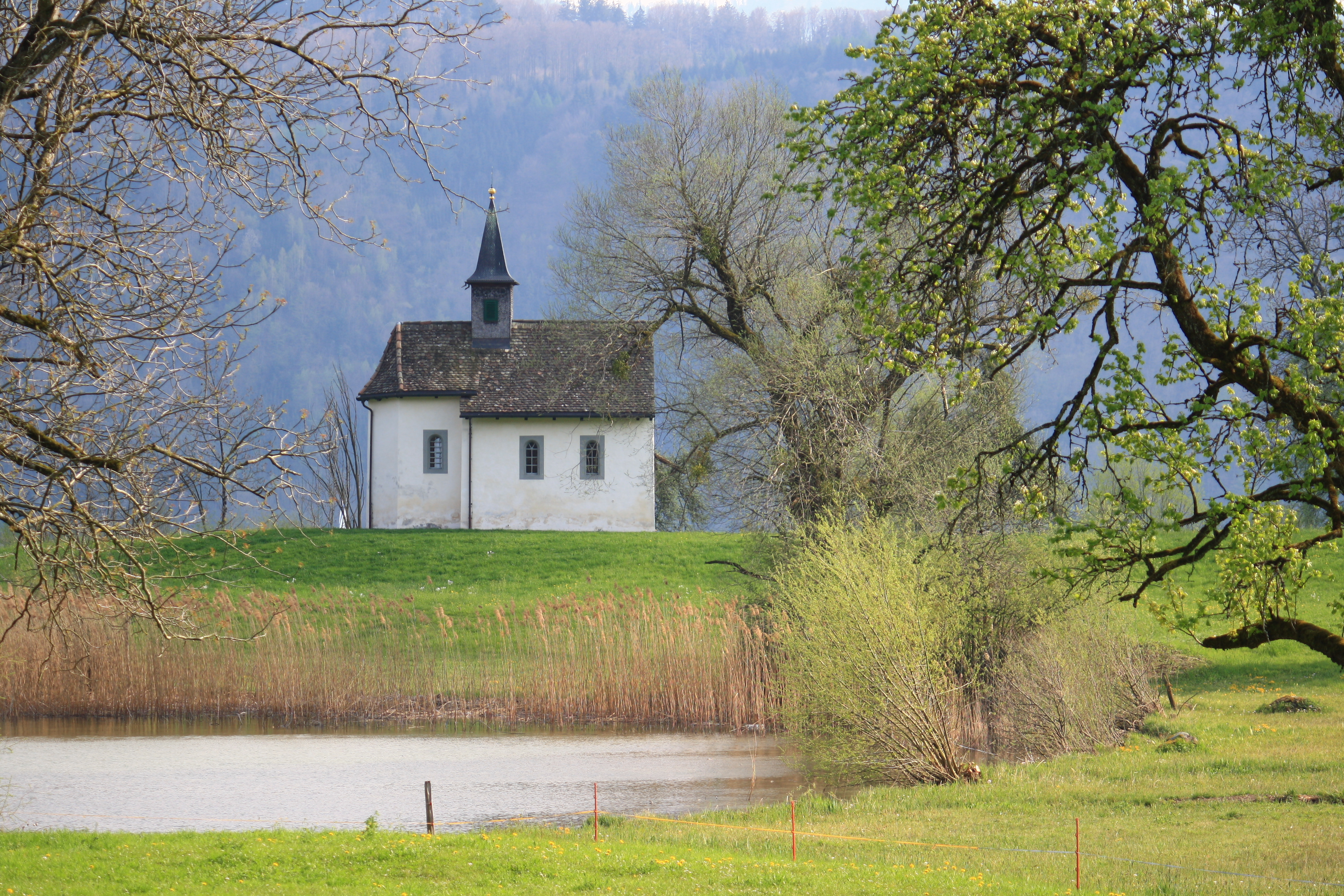 St. Meinrad Kapelle in Bollingen on Obersee (upper Lake Zürich) shore